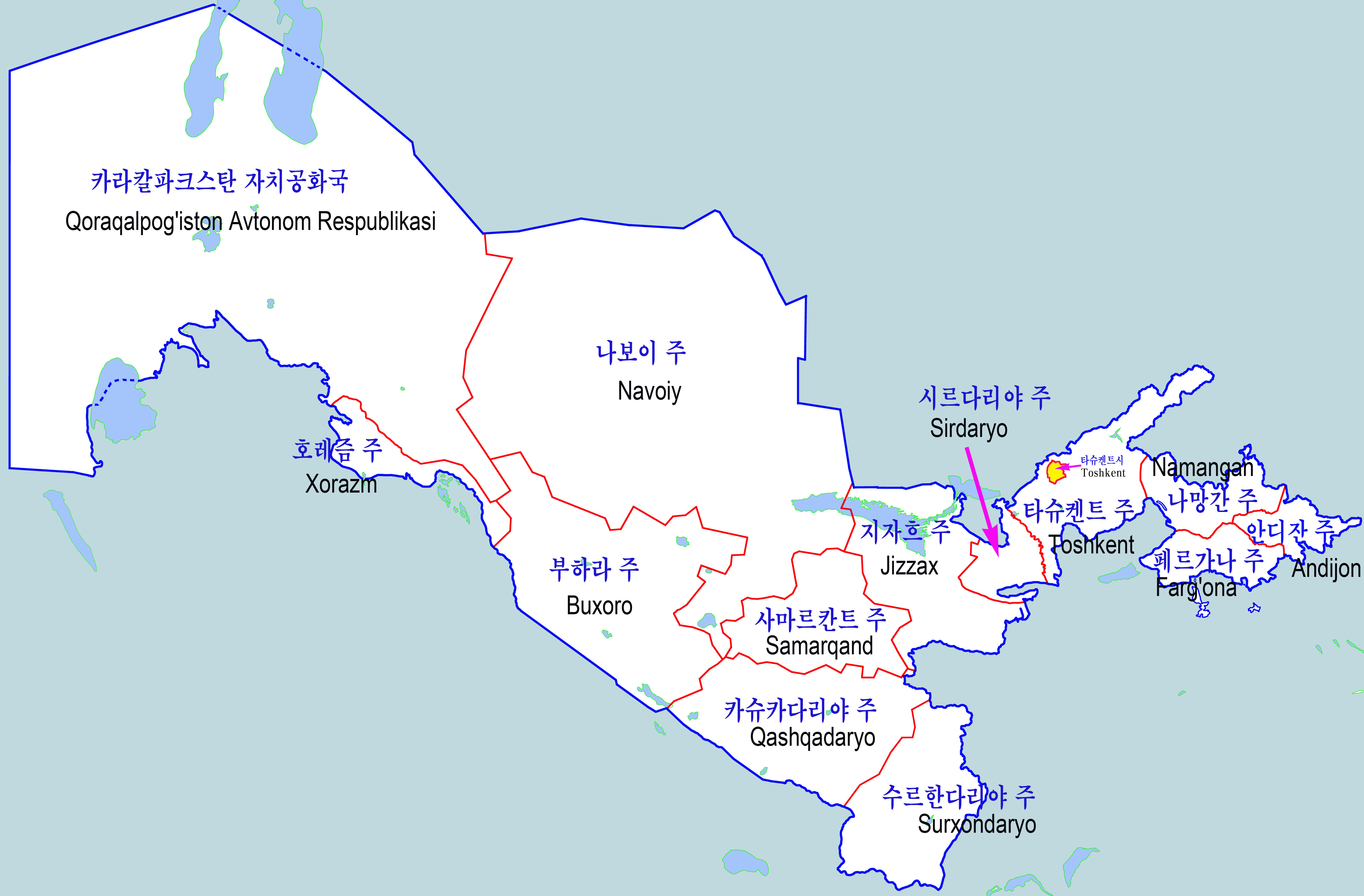 우즈베키스탄 행정구역